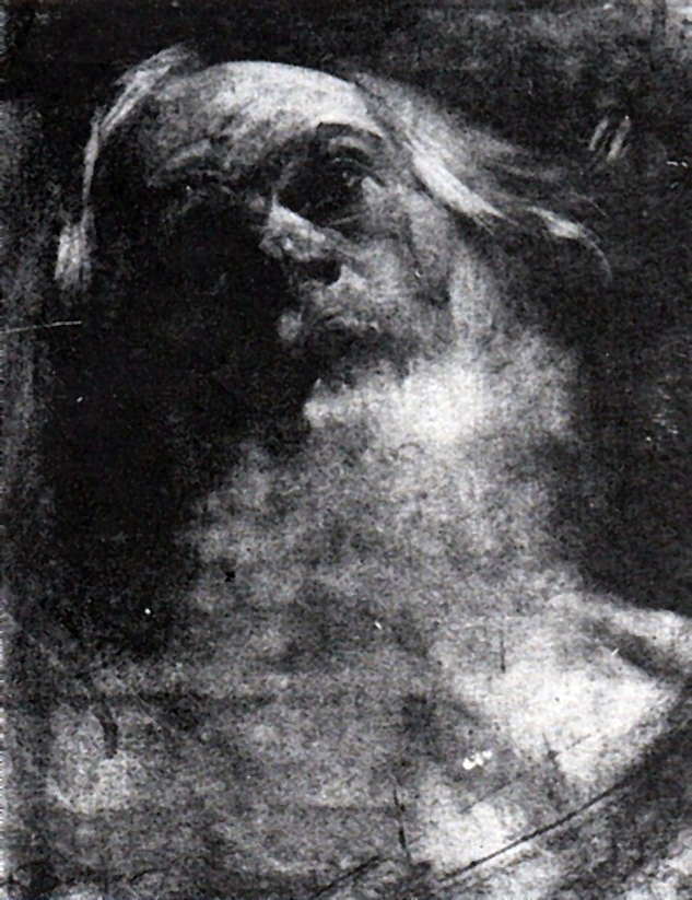 Cap de expresie - Studiu de academie